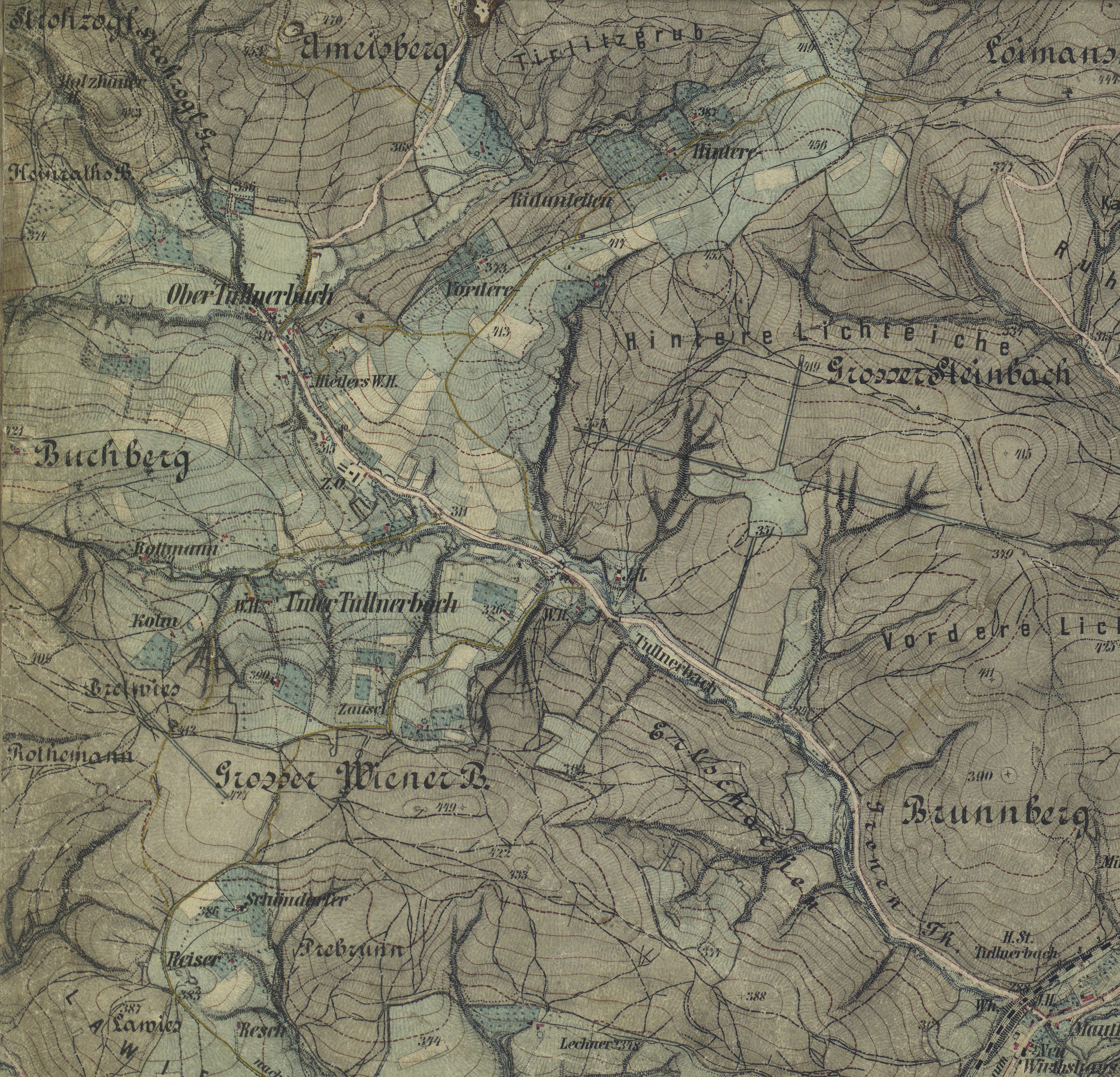 Die alten Bezeichnungen Ober Tullnerbach und Unter Tullnerbach im heutigen Irenental. Irenen Th. steht rechts unten zu Beginn des Tals.